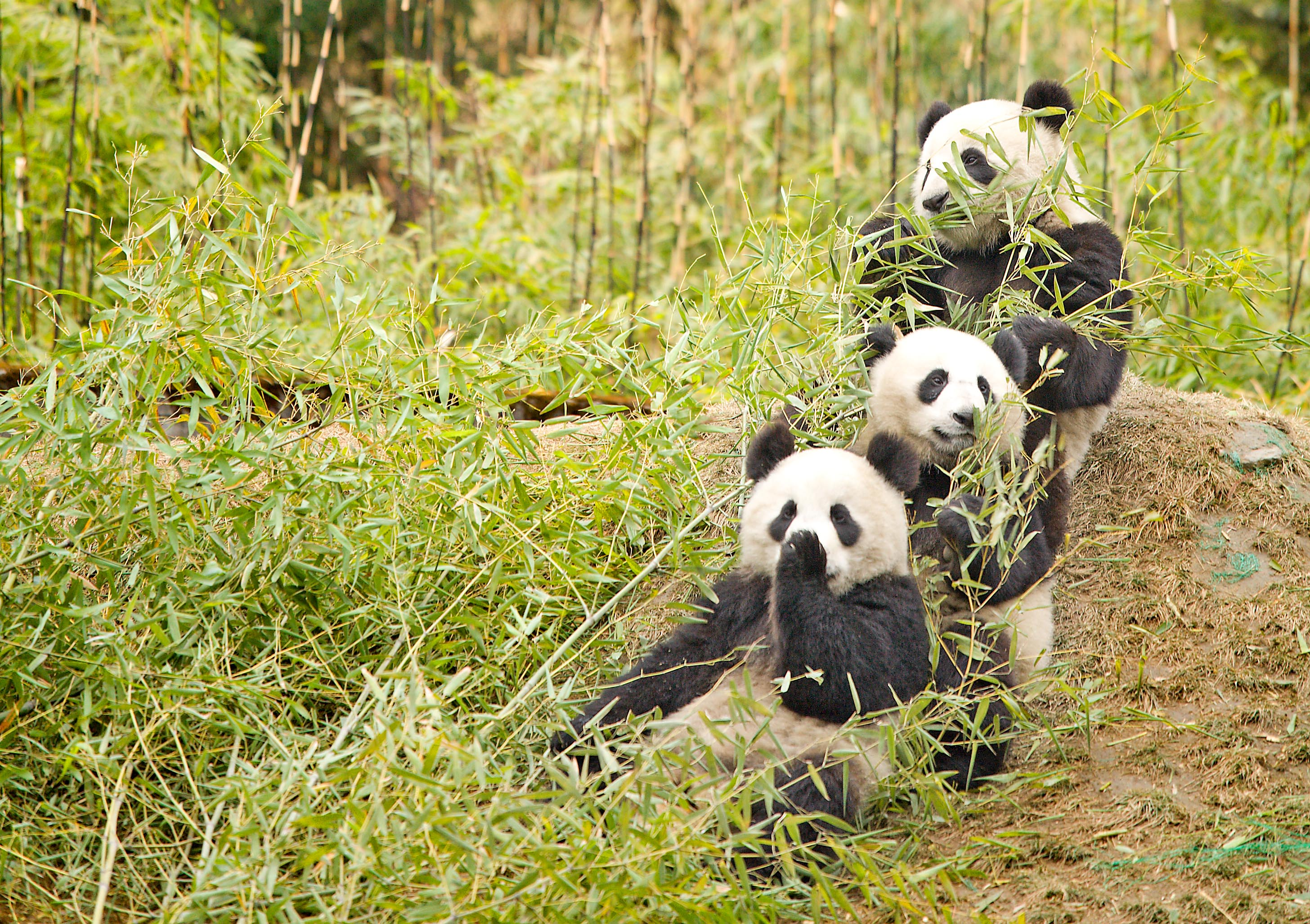 Pandas!! (GIANT PANDA/WOLONG/SICHUAN/CHINA)